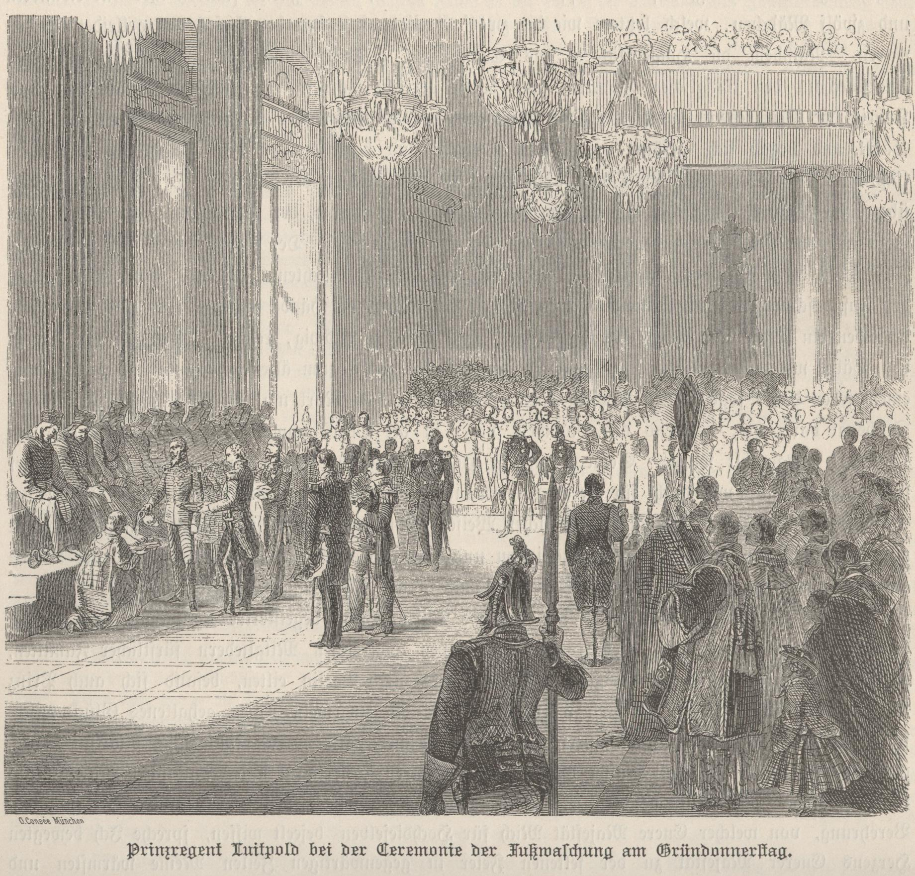 Hoffußwaschung durch Prinzregent Luitpold